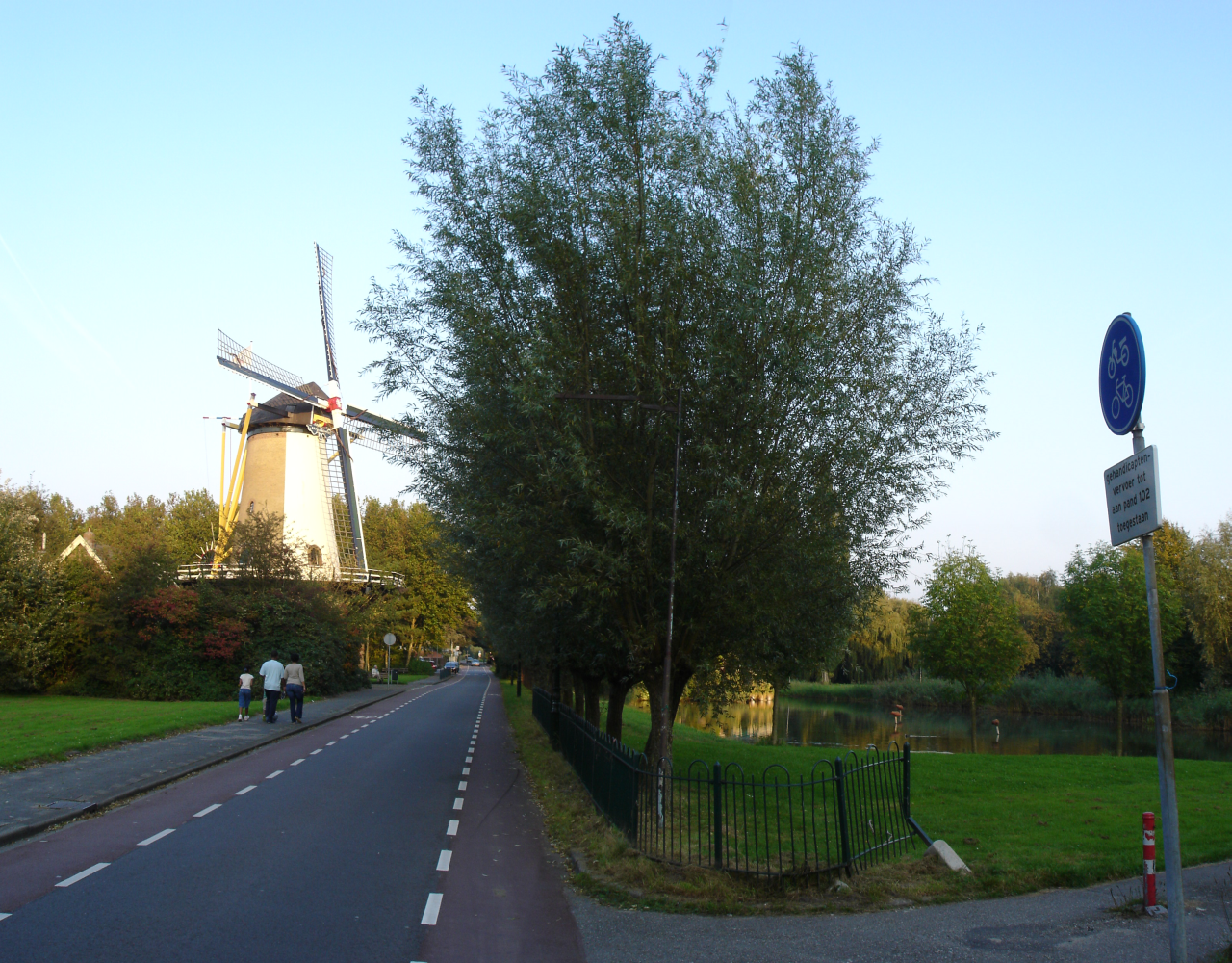 The "Kromme Zandweg" in Charlois, Rotterdam-Zuid, The Netherlands. View on windmill "De Zandweg"